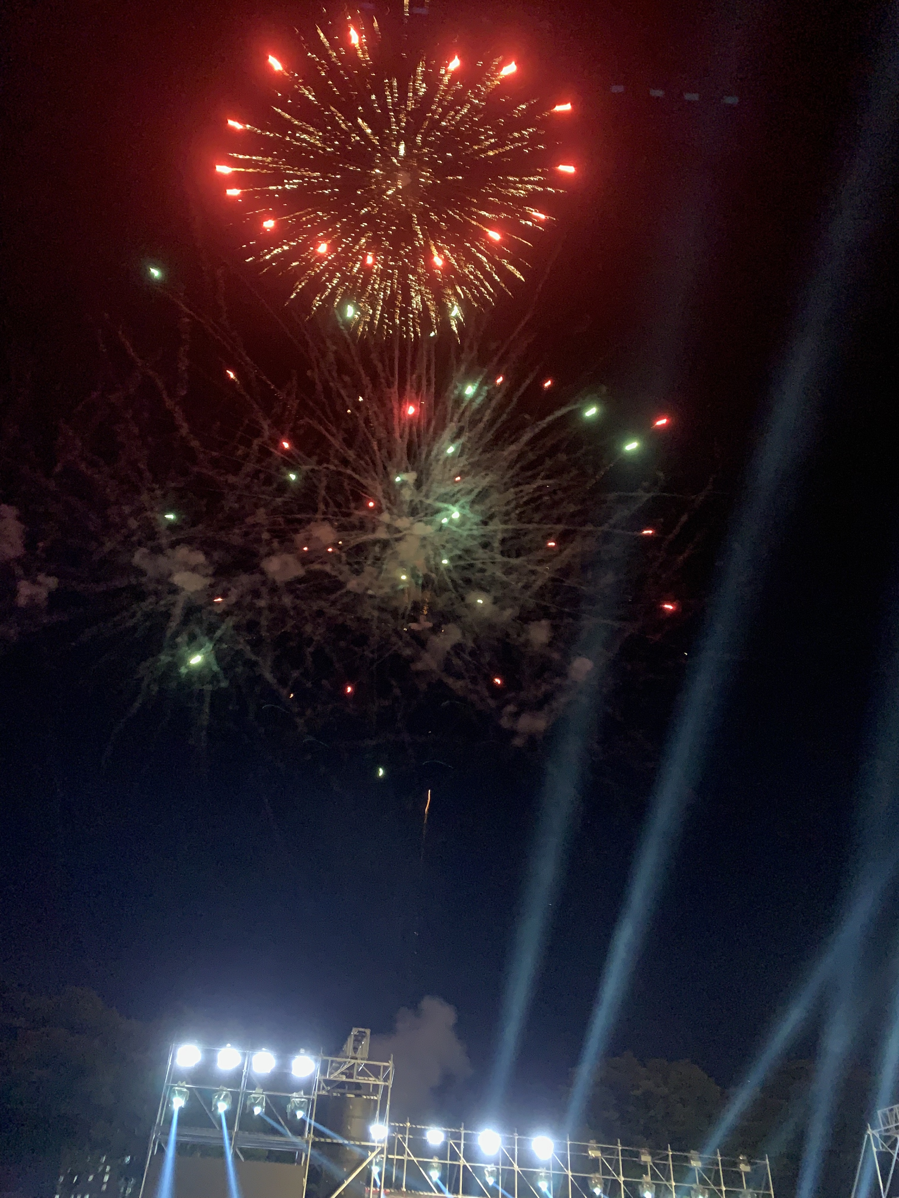 우리들의 등록금이 폭죽이 되어 터졌다.